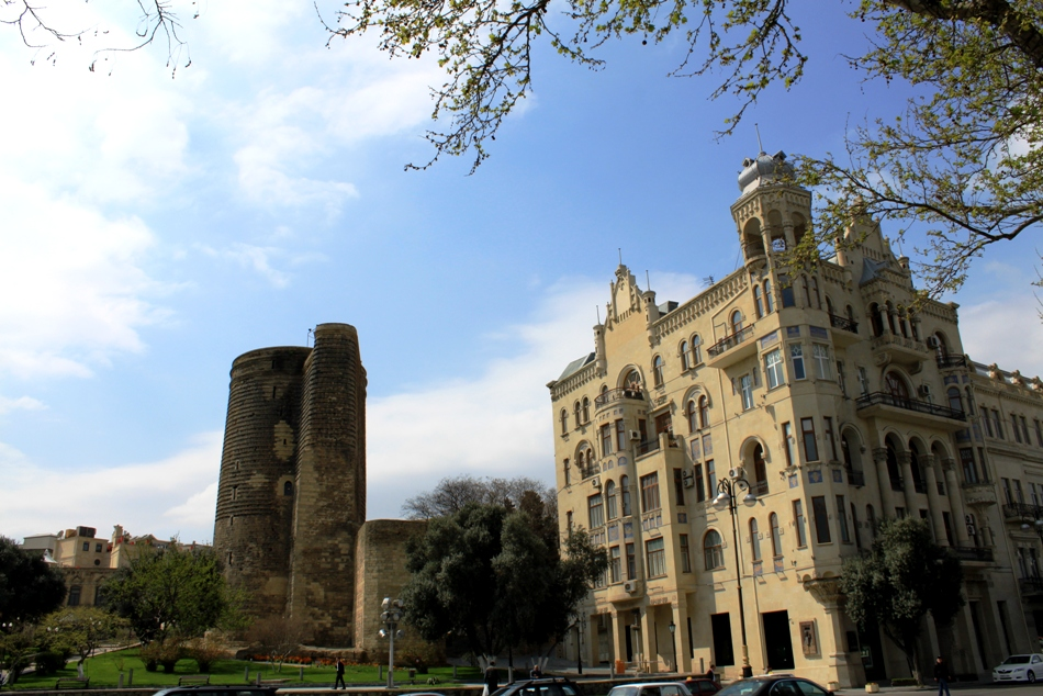 Проспект нефтяников в Баку.